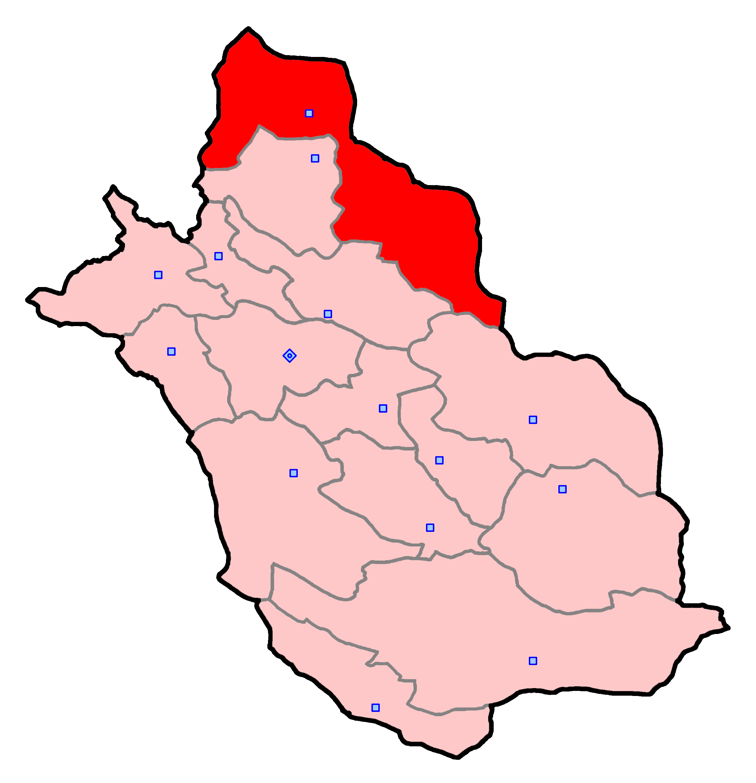 حوزهٔ انتخاباتی آباده و بوانات و خرم‌بید برای انتخابات مجلس شورای اسلامی